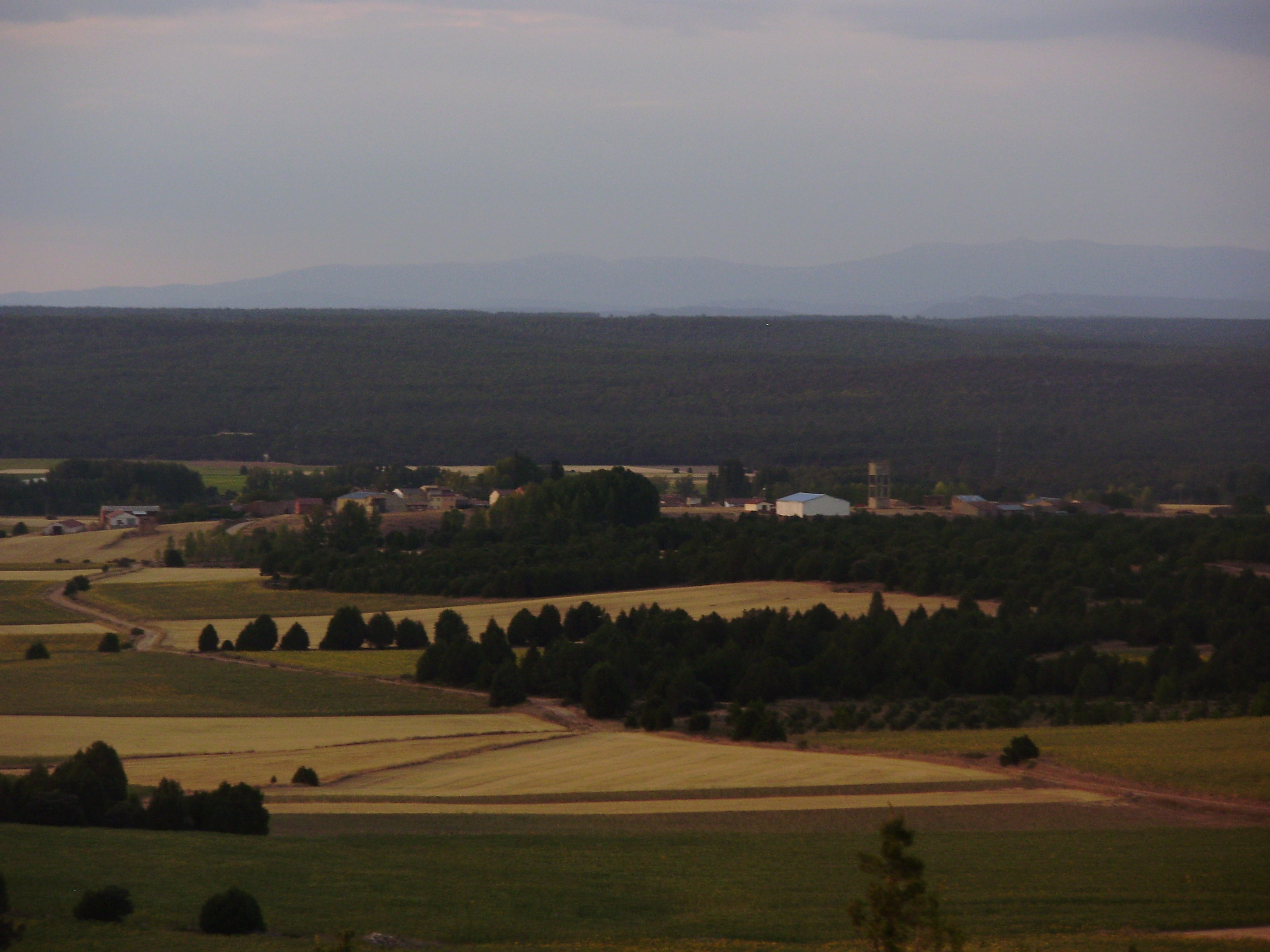 Vista del pueblo de Morales desde el paraje de La Hoz